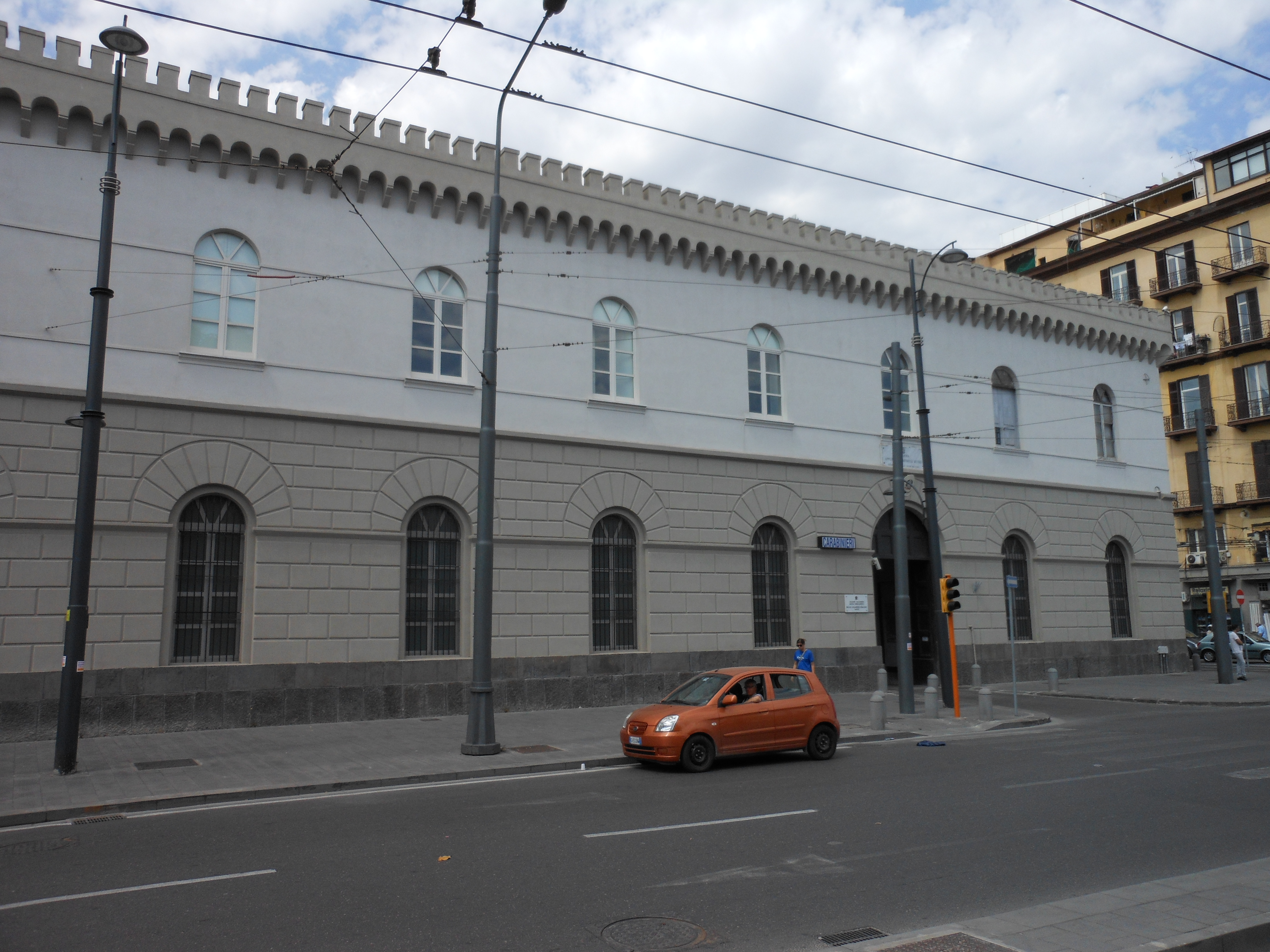 L'edificio neorinascimentale della caserma Sani ripreso da via Marina a Napoli